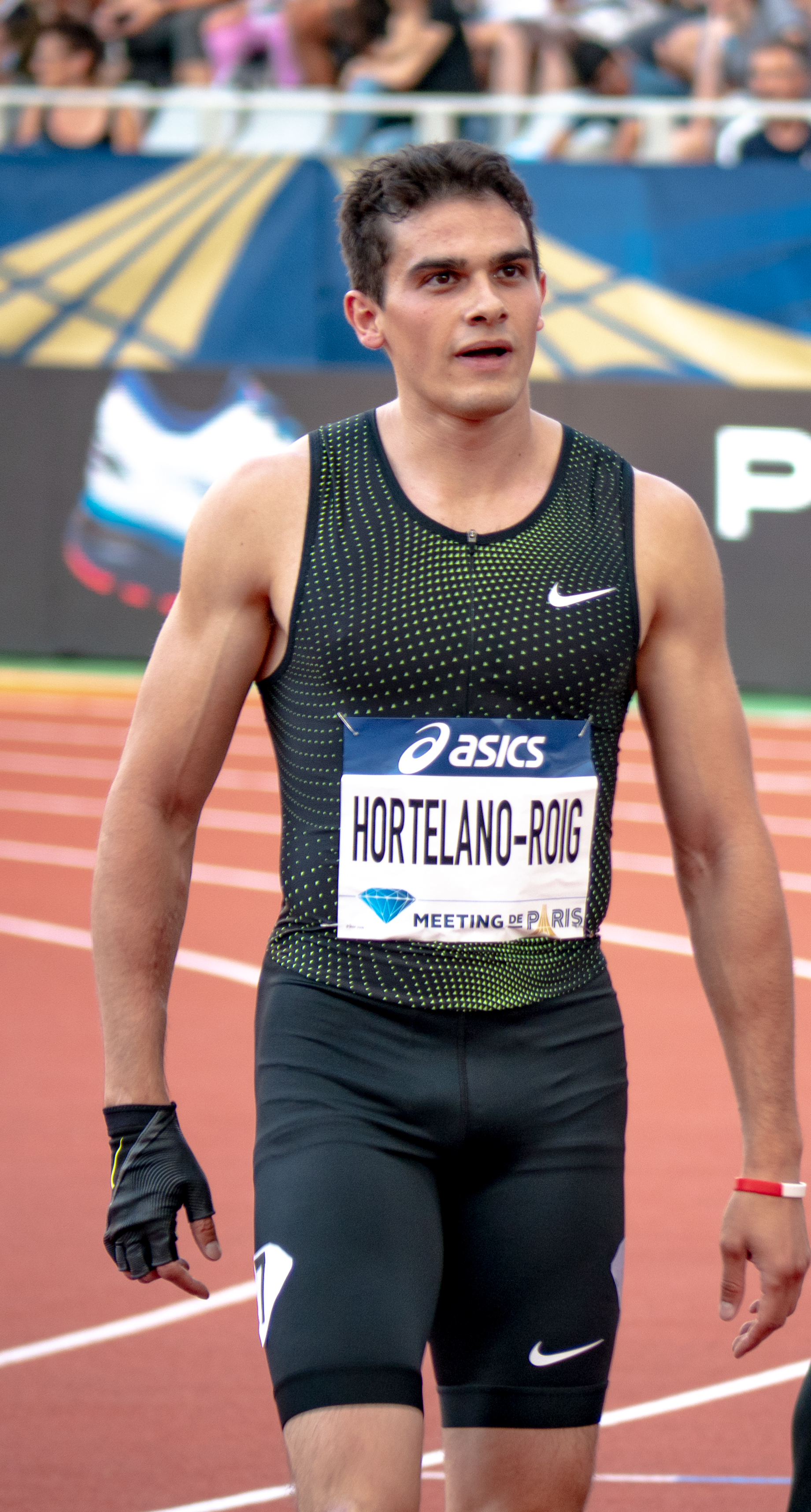 Bruno Hortelano-Roig